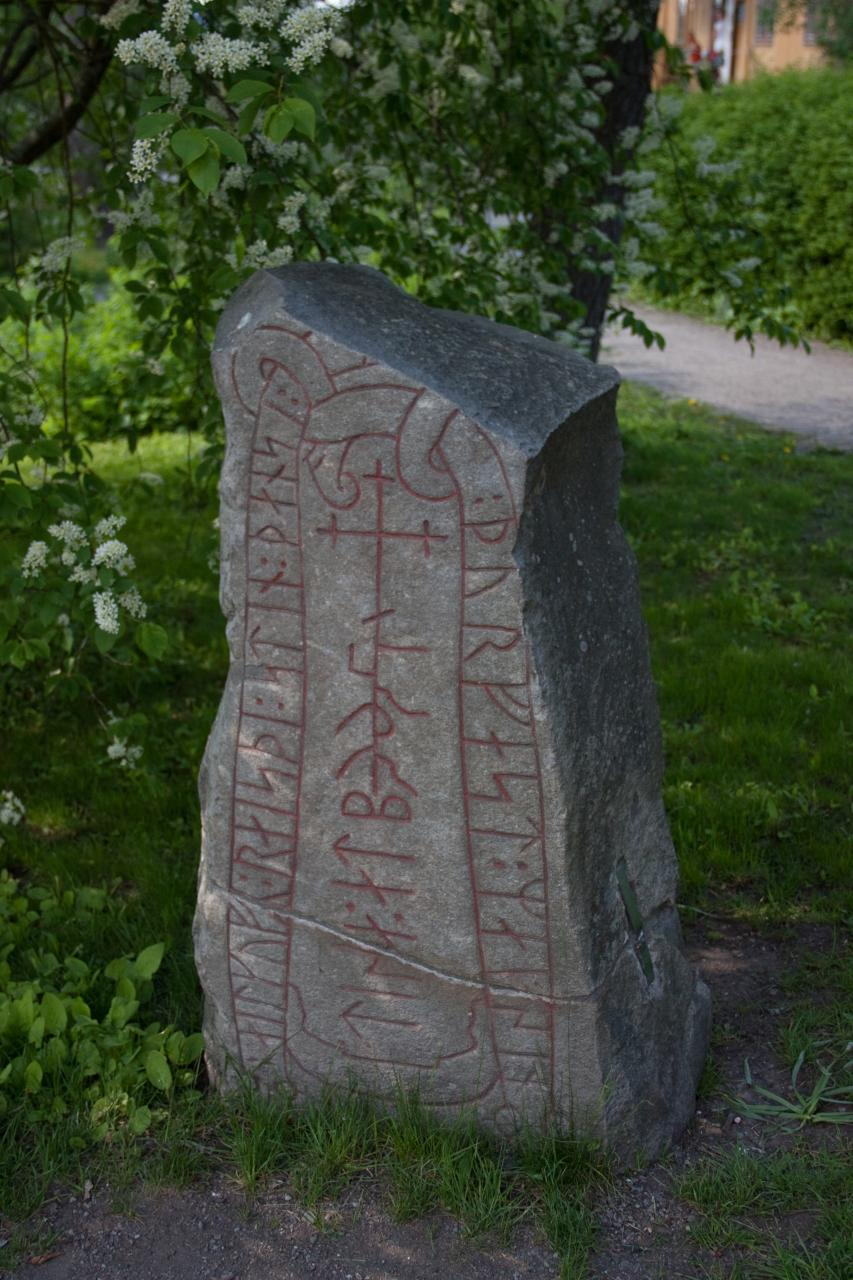 Runestone Sö 352 from Linga Museo all'aperto Skansen - Stoccolma